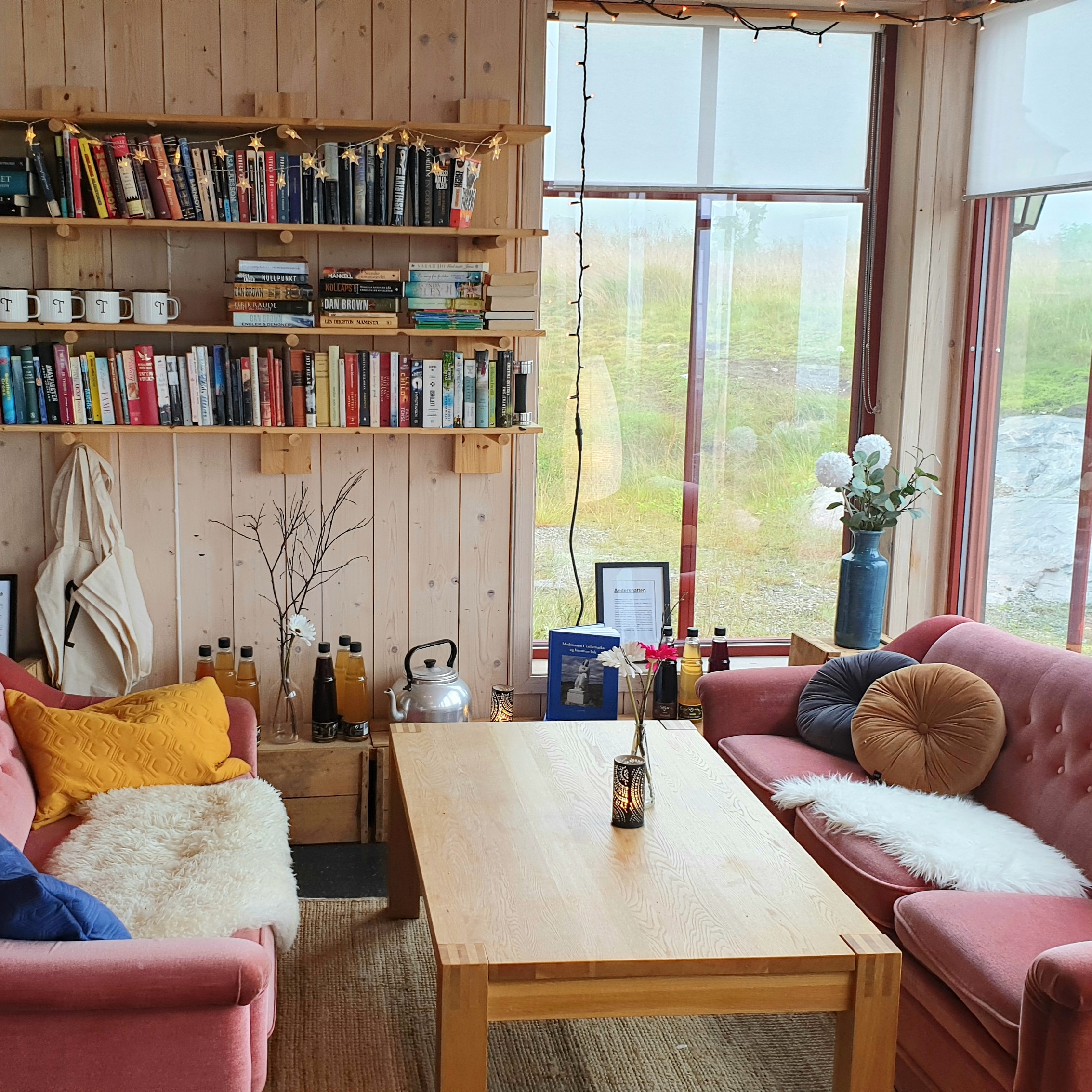 Her kan du både låne og levere bøker